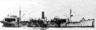 das Flugzeugmutterschiff ANSWALD